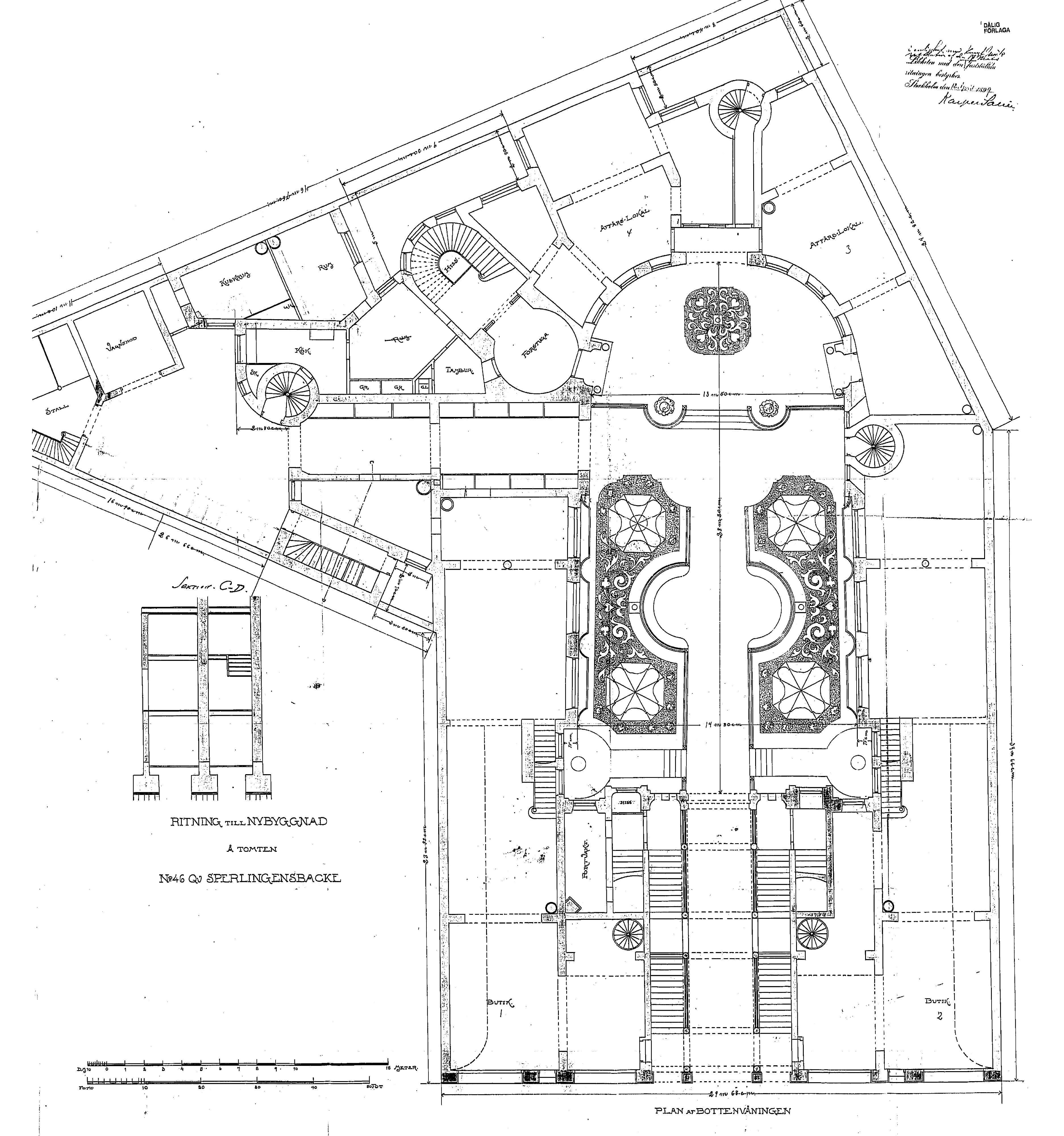 Sperlingsbacke 46 (nuvarande 56), Birger Jarlsgatan 18, planritning. Utställningslokaler för Ostermans bilhandel